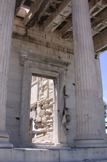 Erechtheion, Porche Nord Date : 16 avril 2004 Auteur : Ifernyen Source : Archives personnelles Catégorie:Image d'architecture grecque antique